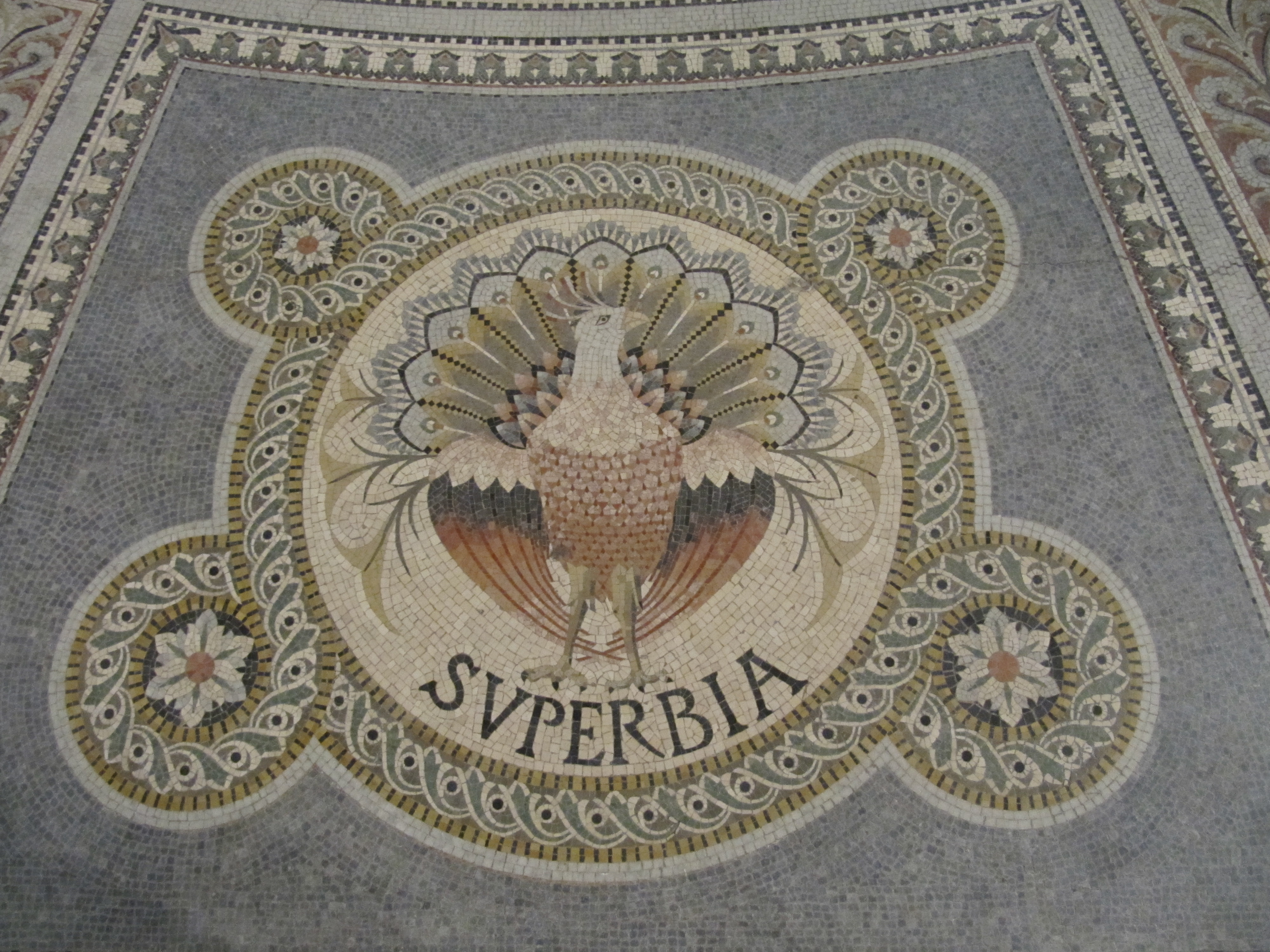 Грех гордыни. Лион, Собор Нотр-Дам-де-Фурвьер, крипта, алтарная часть; мозаика.